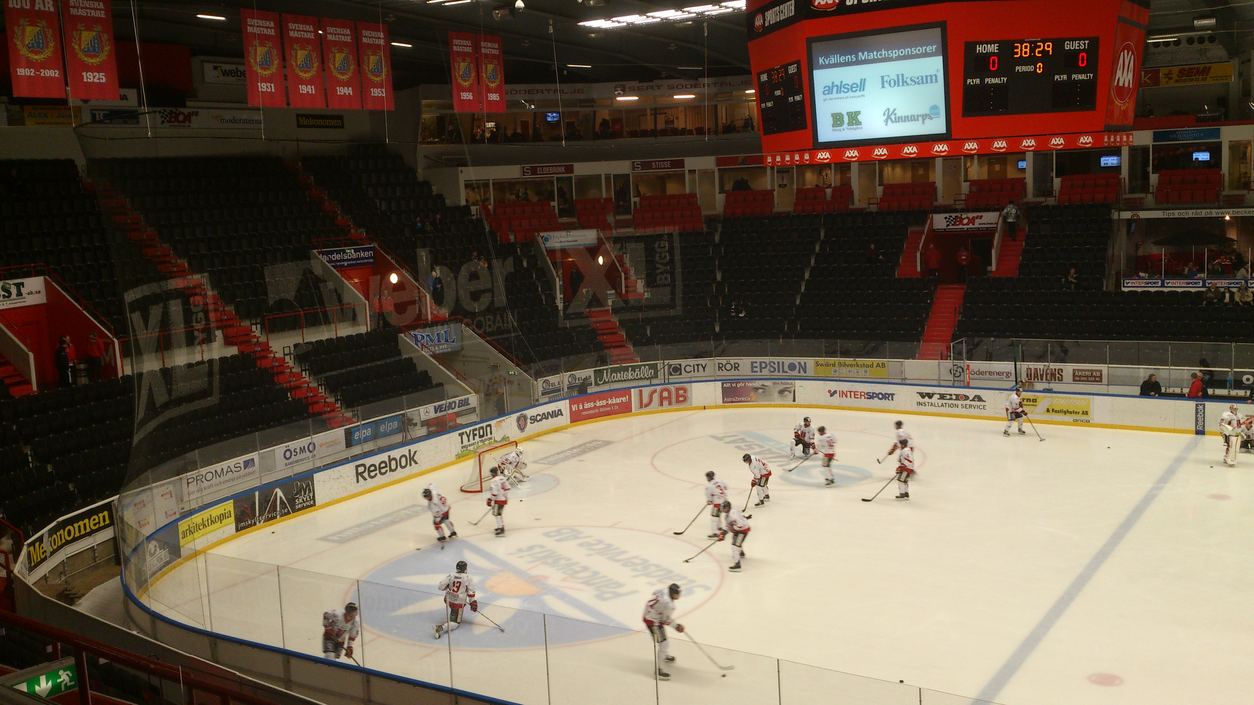 AXA Sports Center i Södertälje februari 2013 inför matchen Södertälje SK-Örebro HK (4-1) i Hockeyallsvenskan.